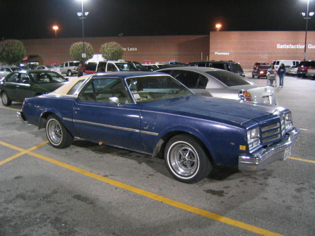 1977 Buick Special coupe